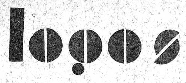 Logos n.º 4. Abril de 1931. Boletín católico mensual.